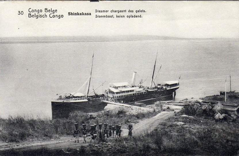 Steam Boat arriving at Shinkakasa, Boma